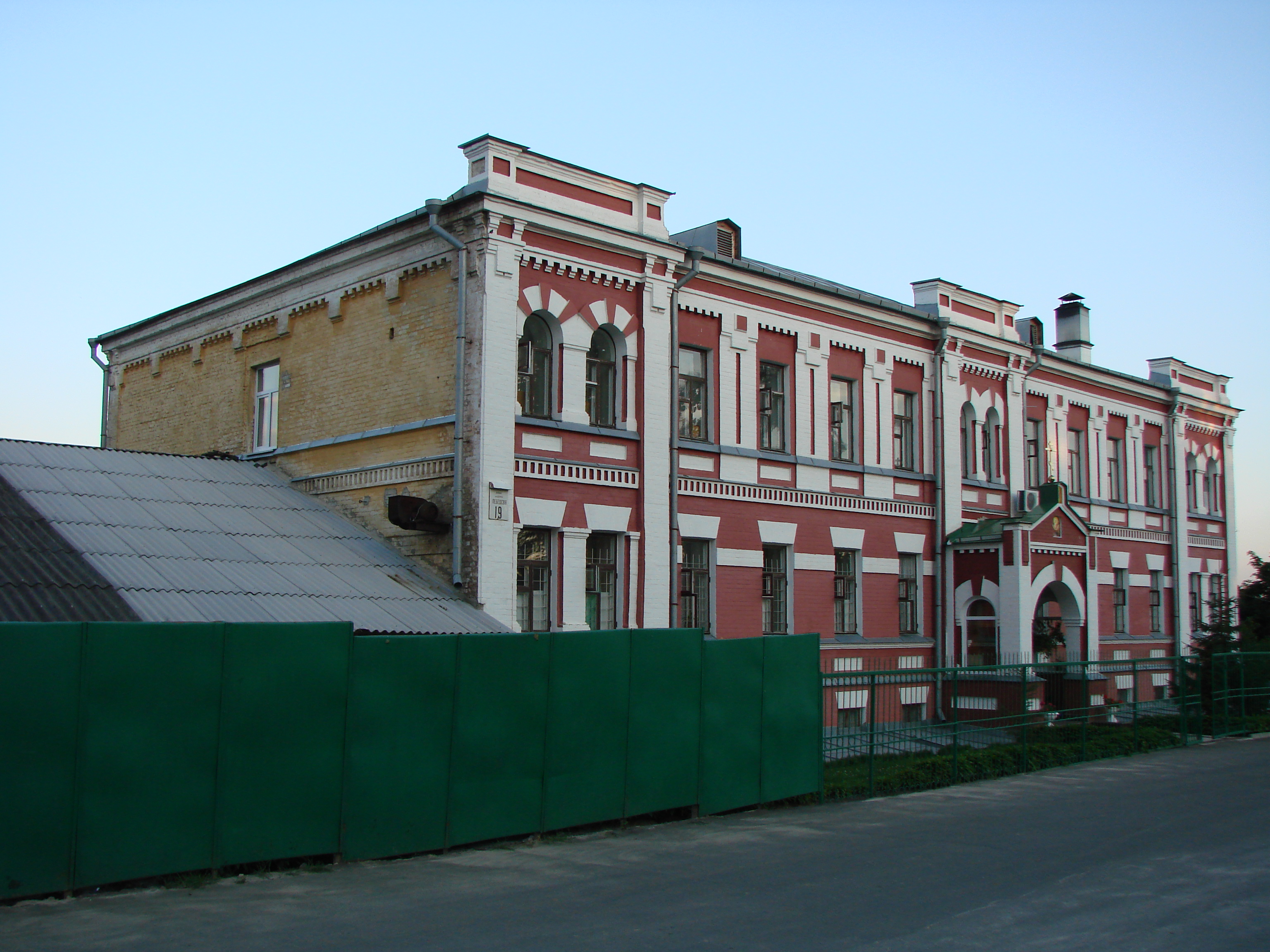 Готель монастиря, Київ, Лебедєва Академіка вул., 19